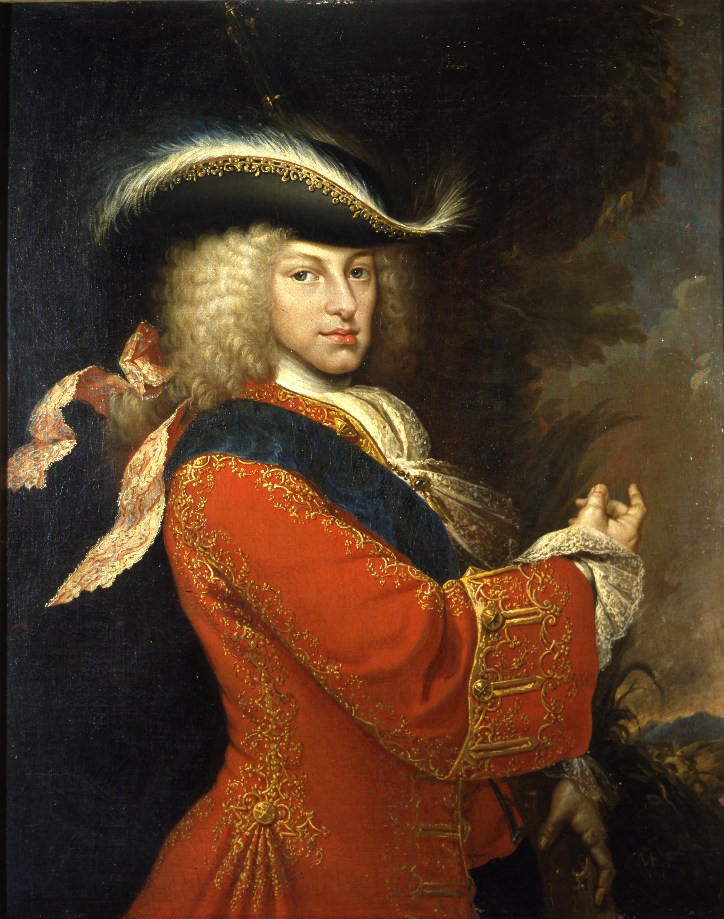 El lienzo representa al rey Felipe V de España (1683-1746), vestido en traje de caza y con una casaca roja.